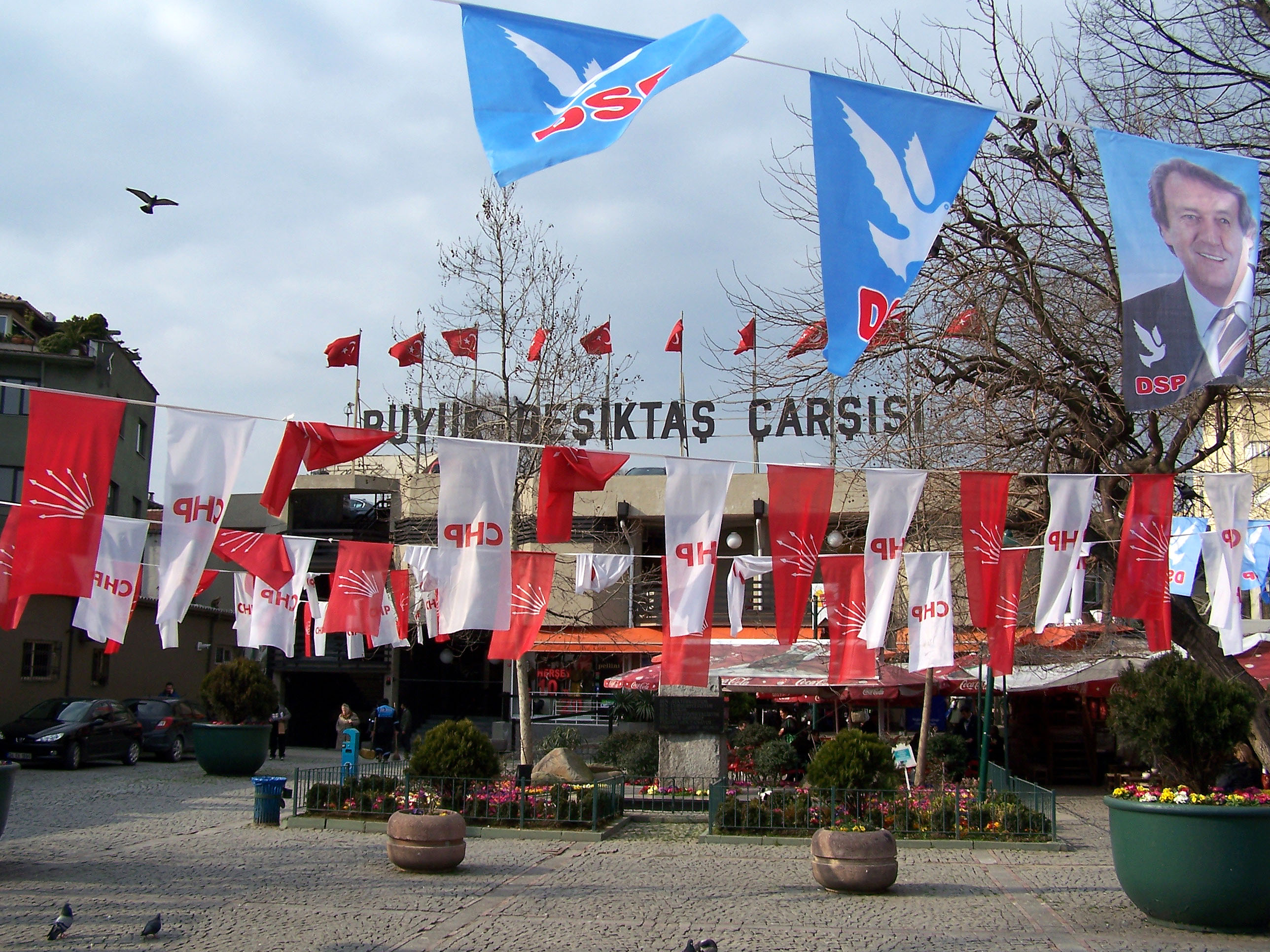 Büyük Beşiktaş Çarşısı in Beşiktaş, İstanbul, Turkey. Visible are CHP (Cumhuriyet Halk Partisi, Republican People's Party) and DSP (Demokratik Sol Parti, Democratic Left Party) flags before the Turkish municipal elections.